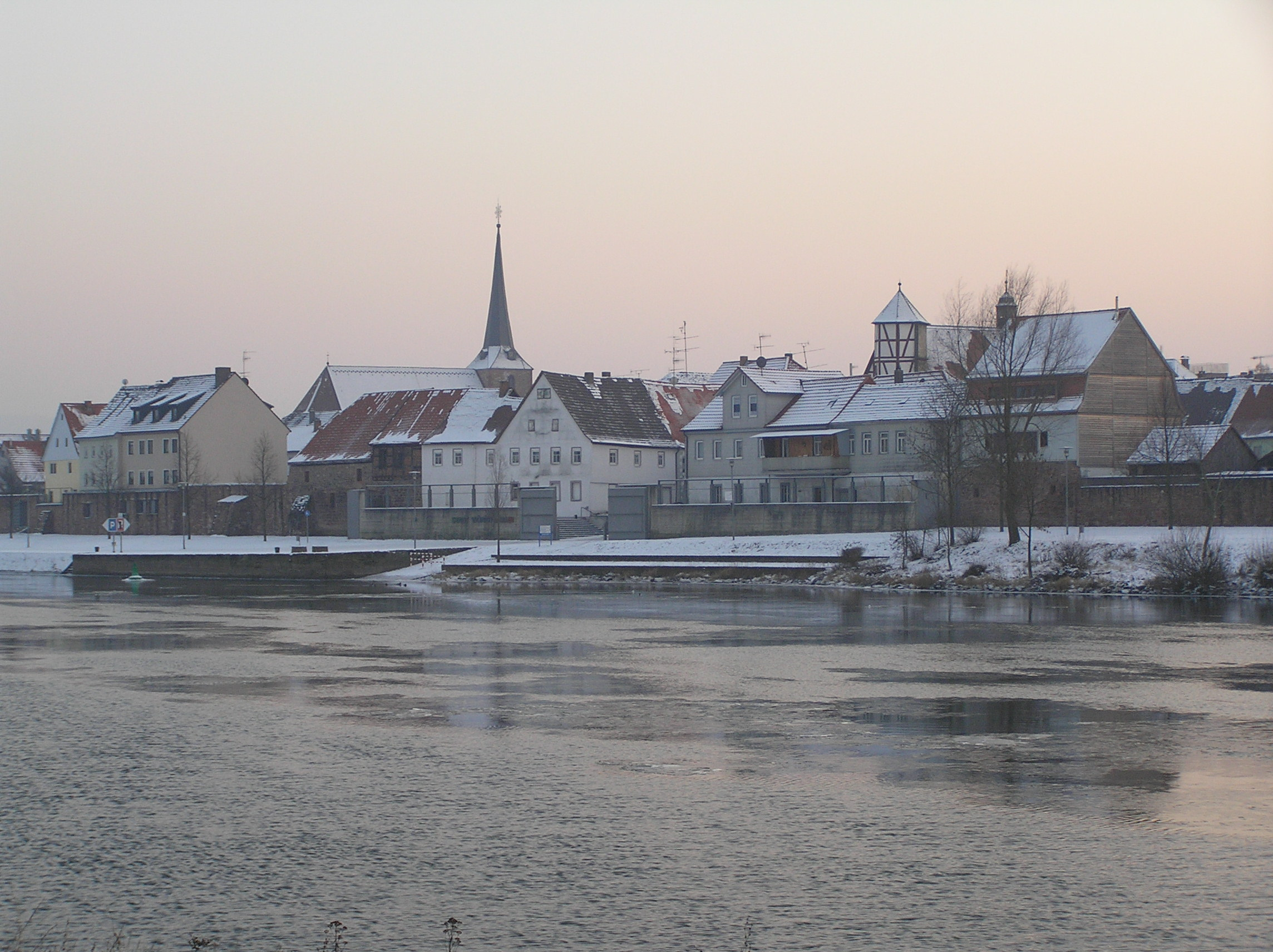 Die Wörther Altstadt mit alter Kirche (heute Schiffbaumuseum), dem Alten Rathaus und der Hochwasserschutzmauer, aufgenommen von Erlenbach aus